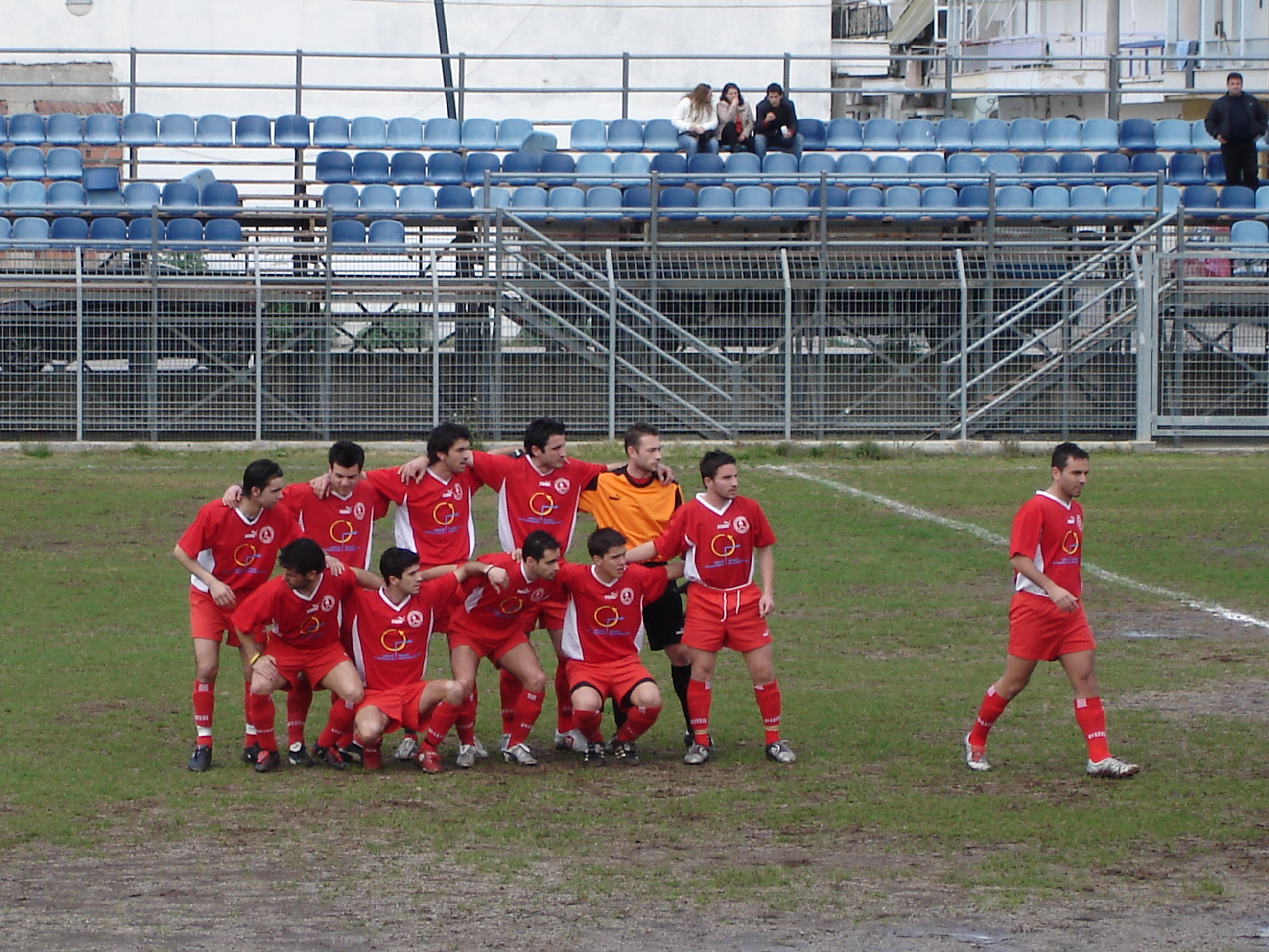 Zavlani Greece